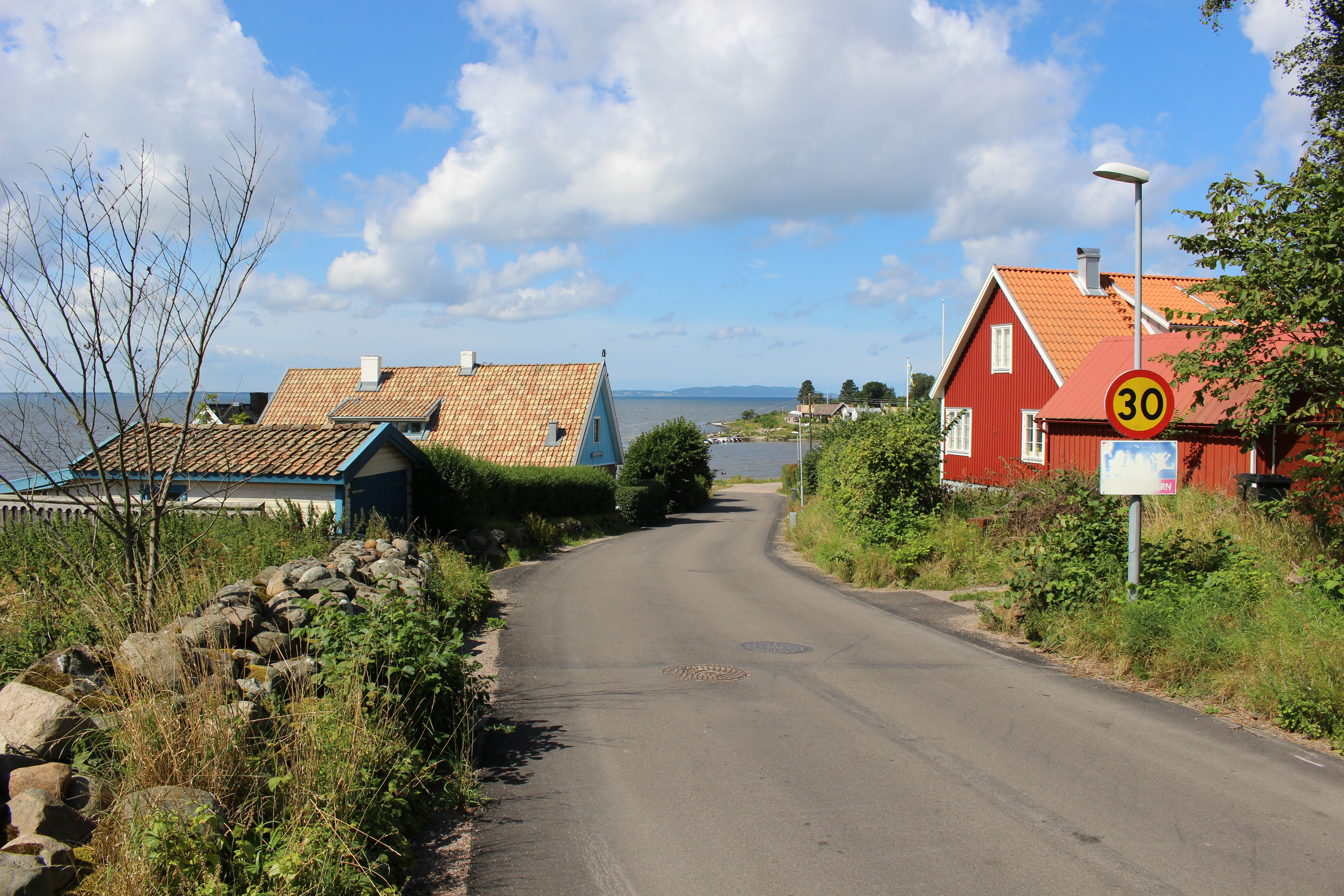 Skepparkroken. Vy mot väster.